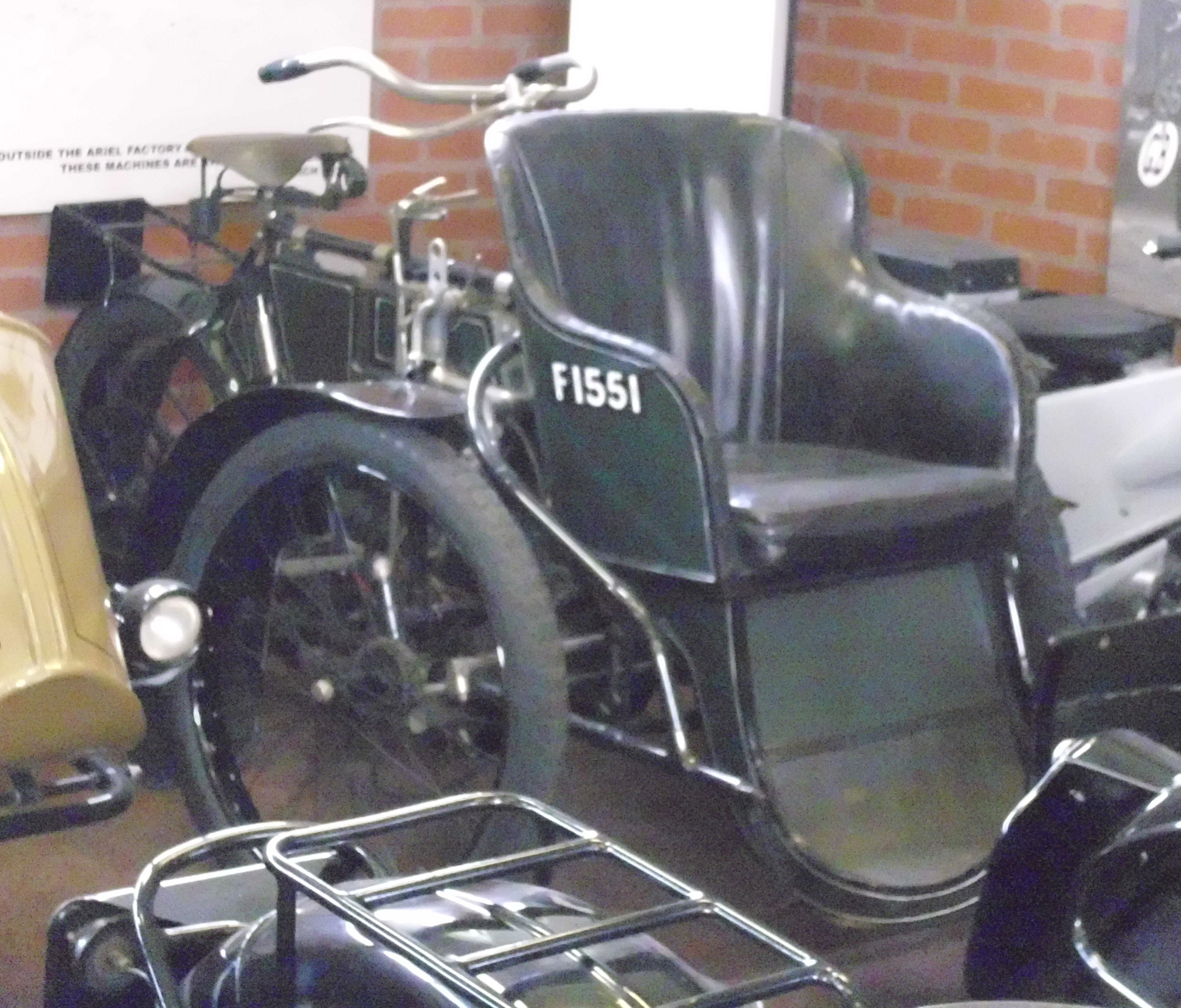 Quadrant Forecar